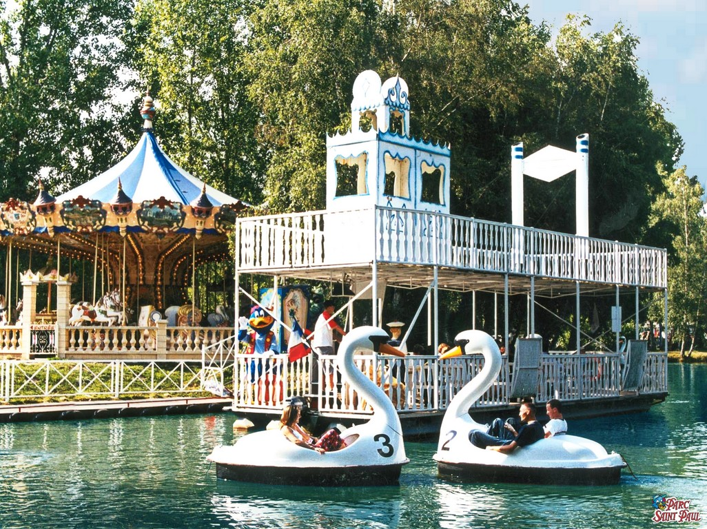 Balade au plan d'eau du Parc Saint Paul